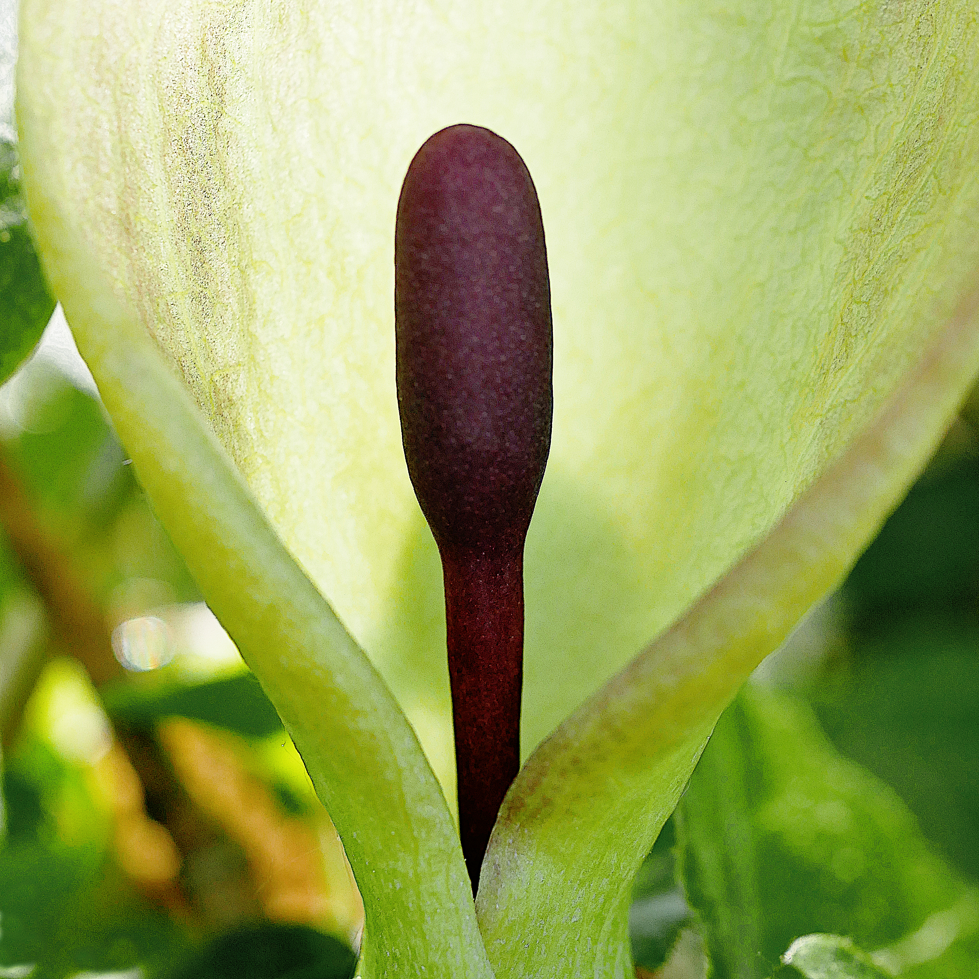 Blüte des Aronstabs im Freilichtmusum Roscheider Hof, Konz - Detail des Kolbens